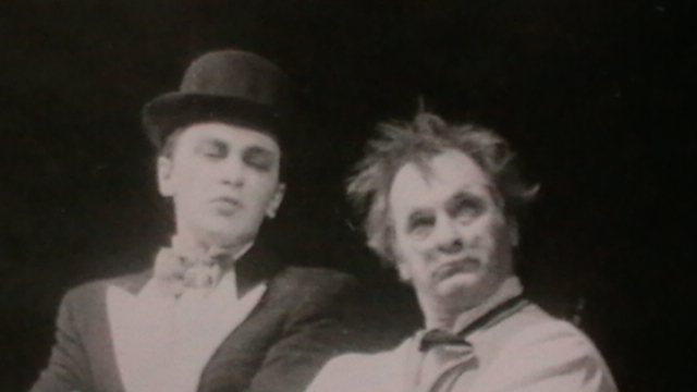 Сцена из спектакля «Дракон» Ленинградского государственного театра им. Ленинского комсомола. В роли Генриха Рустем Гумеров, в роли Бургомистра Лев Лемке, режиссёр-постановщик Егоров Геннадий Семёнович